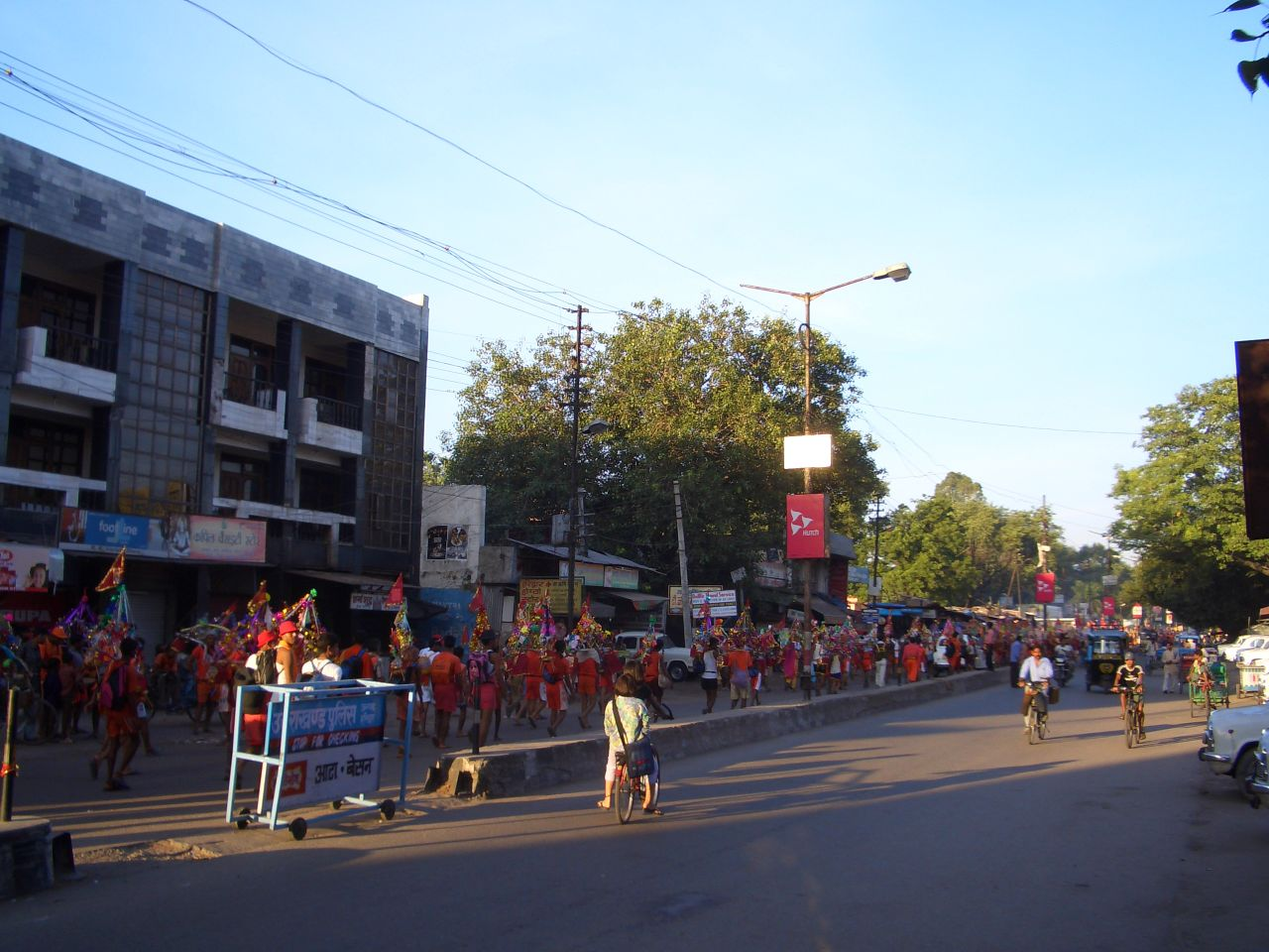 haridwar